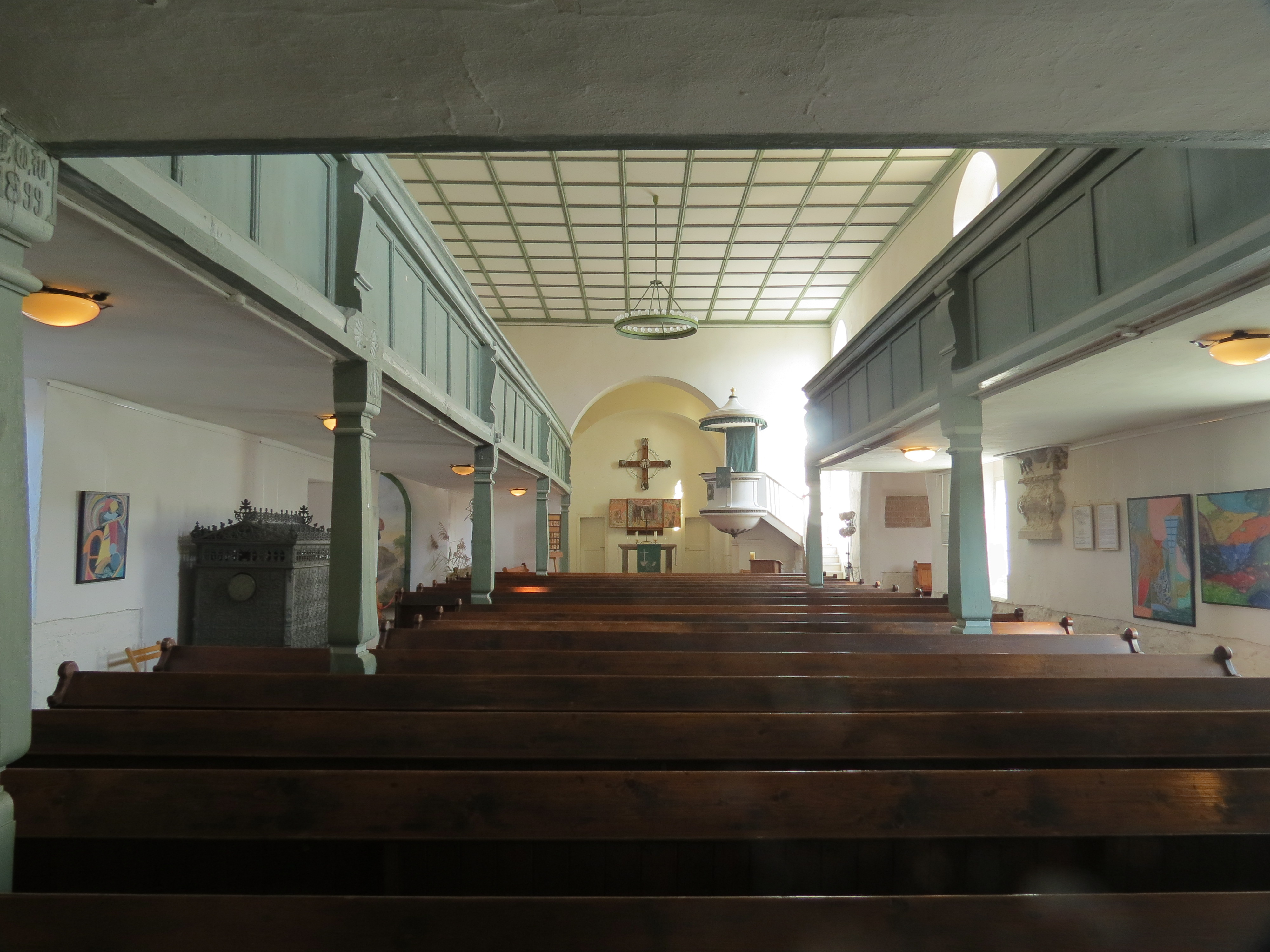 Stadtkirche Mutzschen, Innenraum, Blick nach Osten